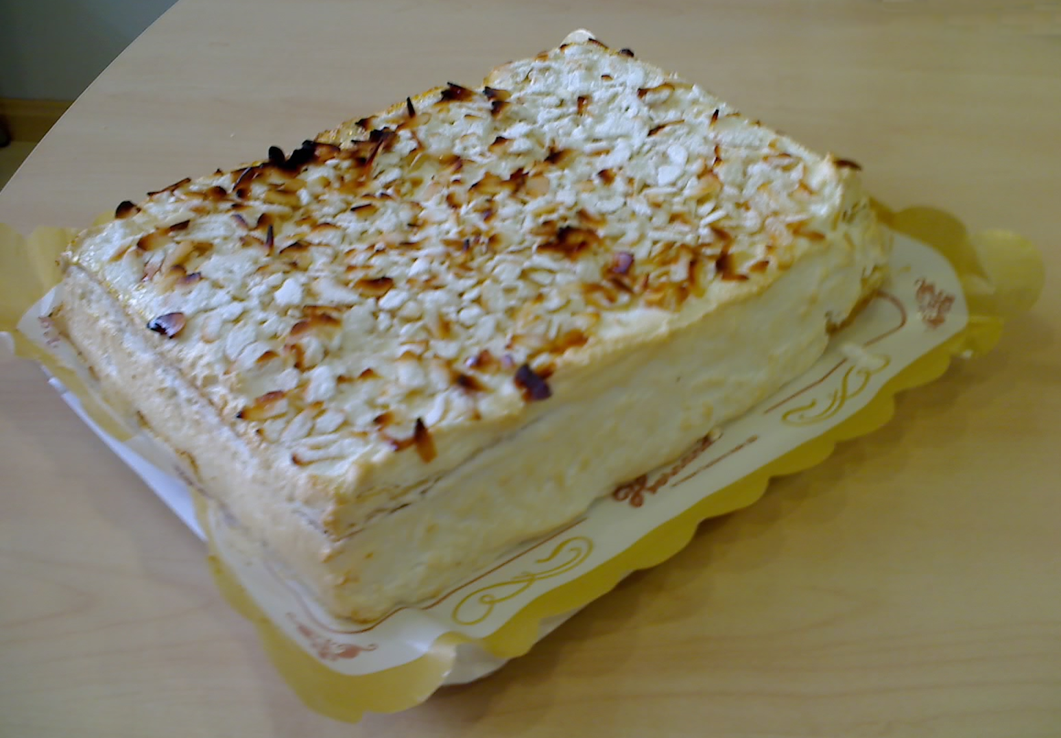 "Costrada" postre típico de Alcalá de Henares (Madrid - España).